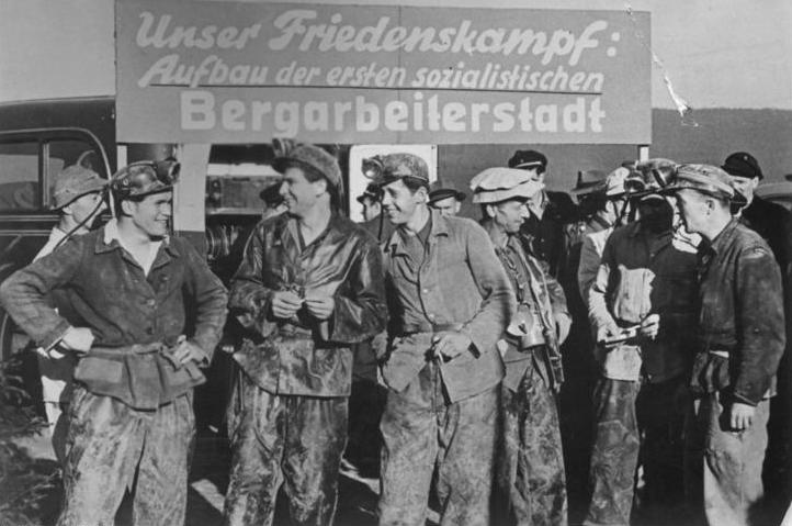 Bergarbeiter nach der Schicht Zentralbild IG.Wismut 24.9.1952 Brigade Hans Bleisch erfüllte 5-Jahresplan in 20 1-2Monaten.Die Jugendbrigade des 23-jährigen Helden der Arbeit Hans Bleisch vom Objekt-Gewerkschaftsvorstand Libor der AG Wismut hat bereits am 16.9.1952 die ihr im Fünfjahrplan gestellten Produktionsaufgaben erfüllt.UBz: Brigade Bleisch